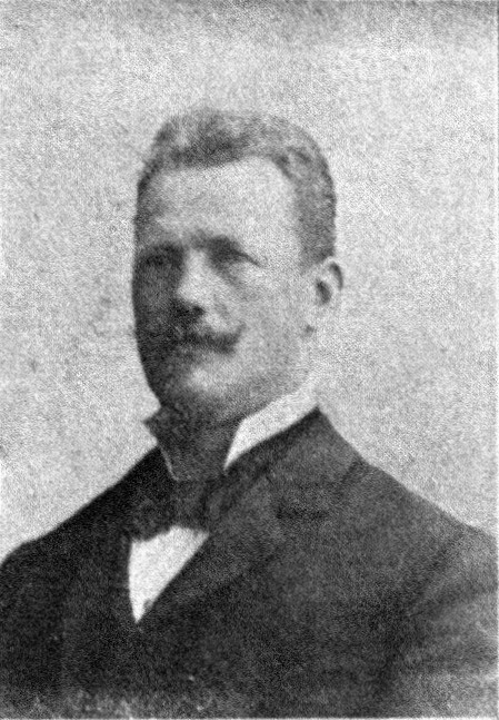 Österreichischer Politiker, Reichsratswahl 1907, Name siehe Dateiname